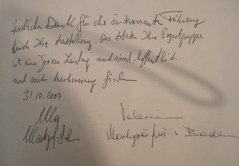 Gästebucheintrag im Städtischen Museum Schopfheim von Max und Valerie von Baden vom 31.10.2007.